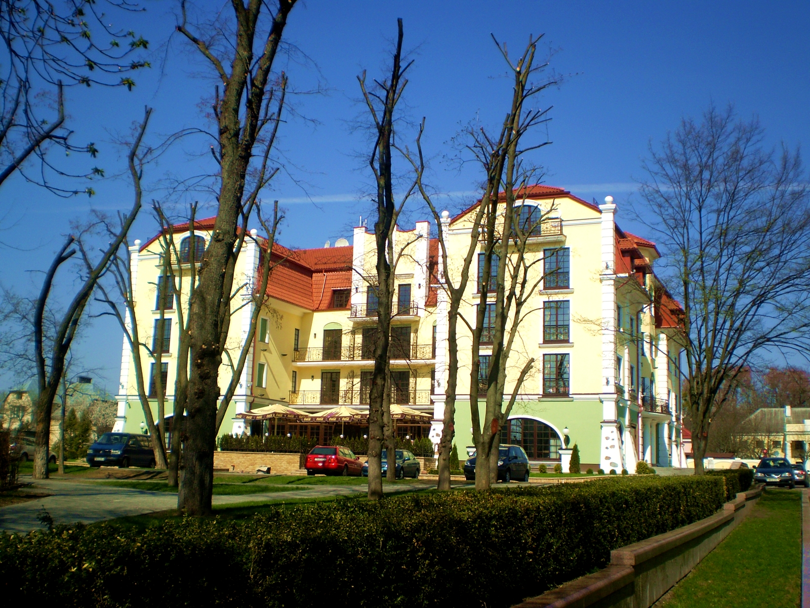 Гасцініца «Эрмітаж»